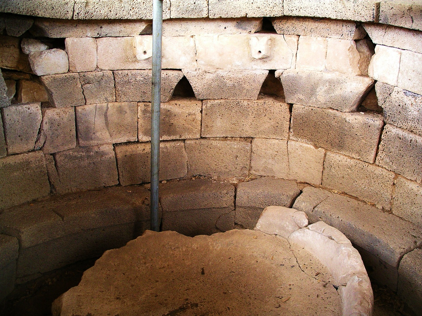 Sedda Sos Carros (Oliena) - Vasca lustrale: dalle protomi a forma di testa di muflone, usciva l'acqua per caduta, sulle persone sedute attorno al bacile centrale.